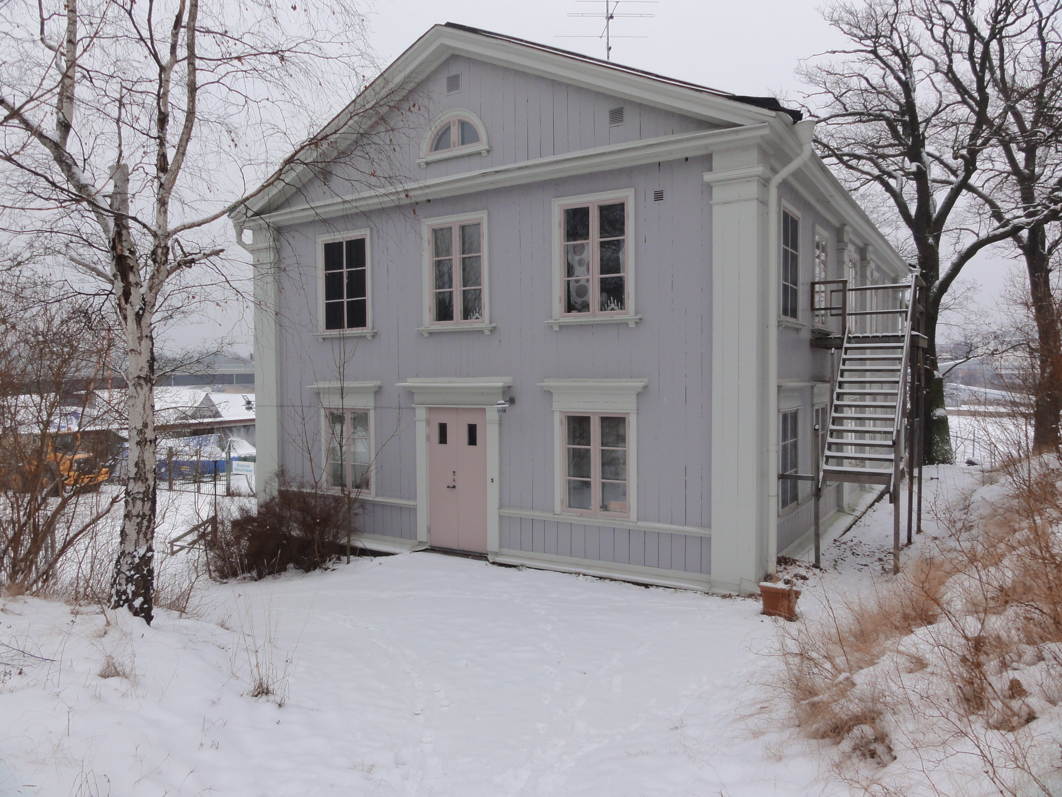 Margretelunds gård; gaveln från landsidan.